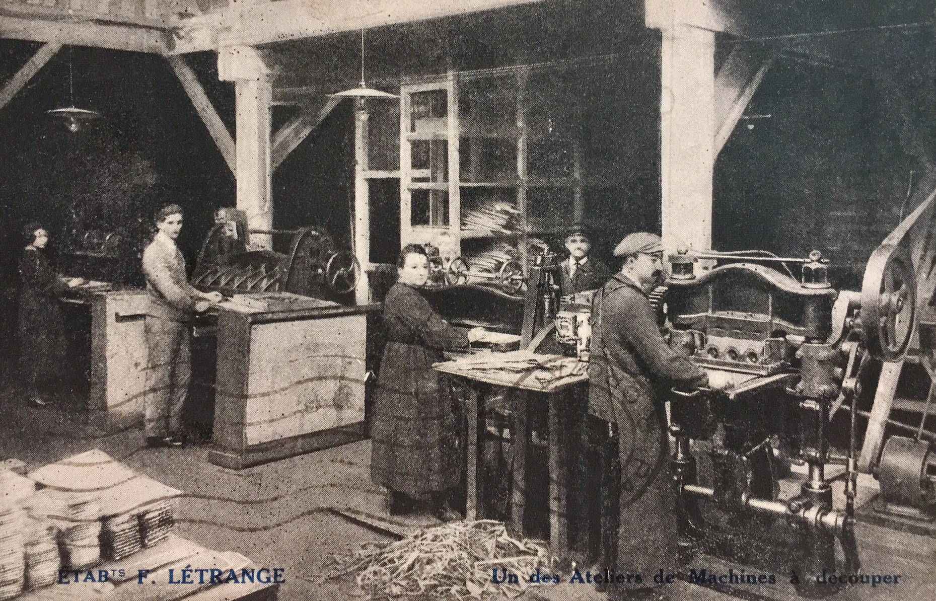 Machines à découper le cuir, Usine Létrange, Paris, 1910.